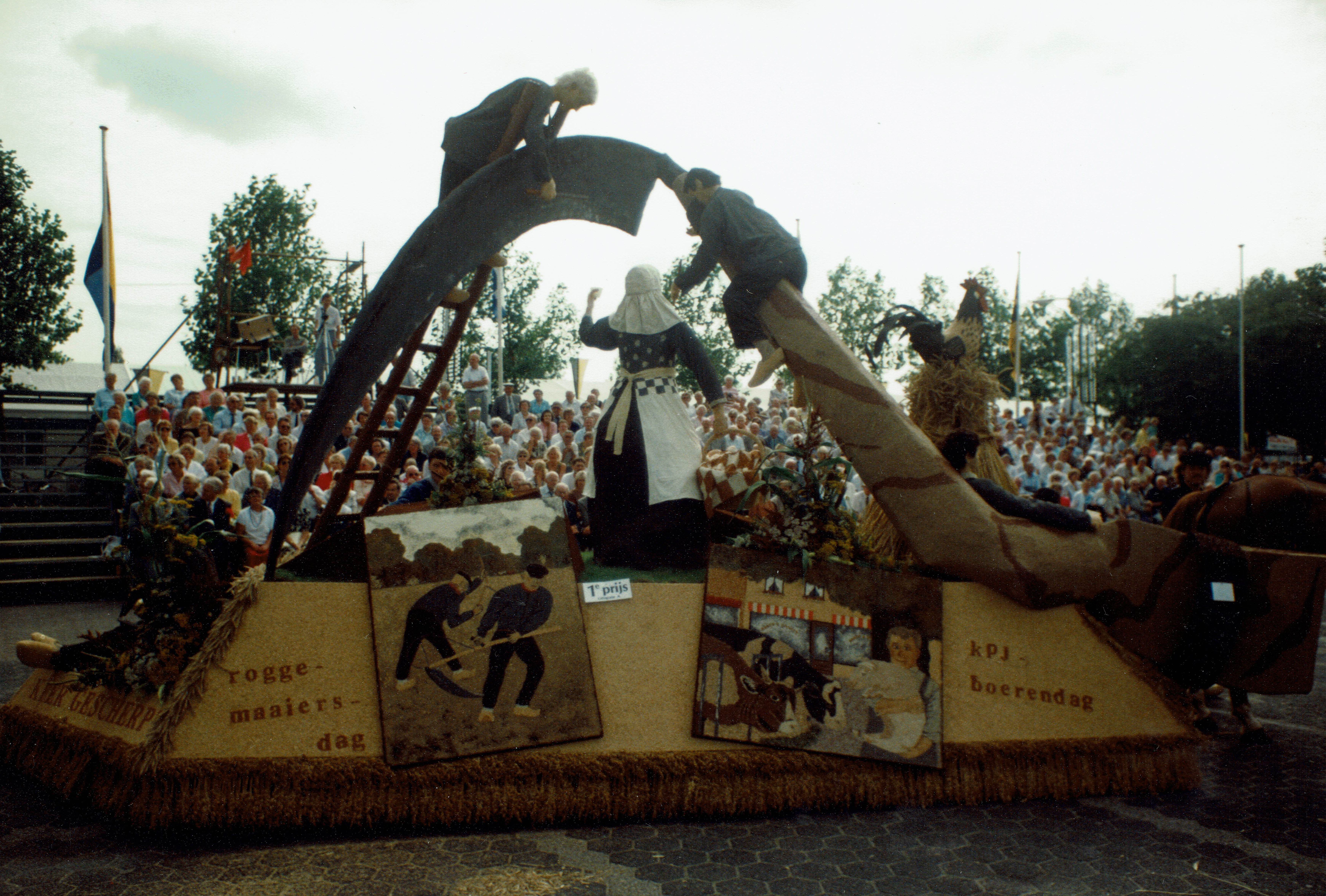 Een wagen met zaden bekleed en beeld de Roggemaaiersdag uit. De wagen rijd over de Domineeskamp waar een presentatie wordt gehouden.